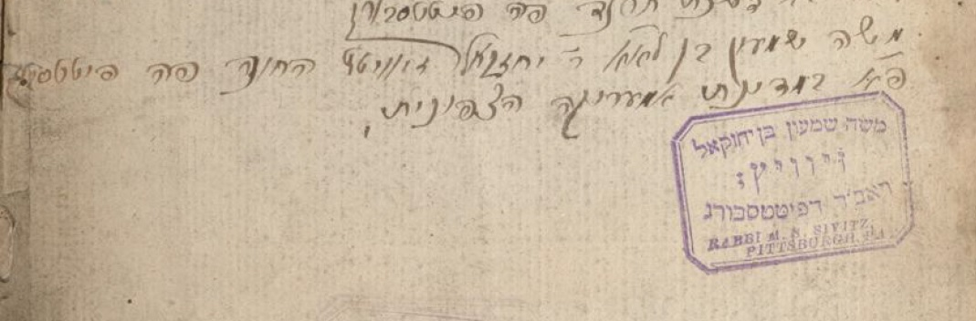 חתימה וחותמת הרב משה שמעון זיוויץ